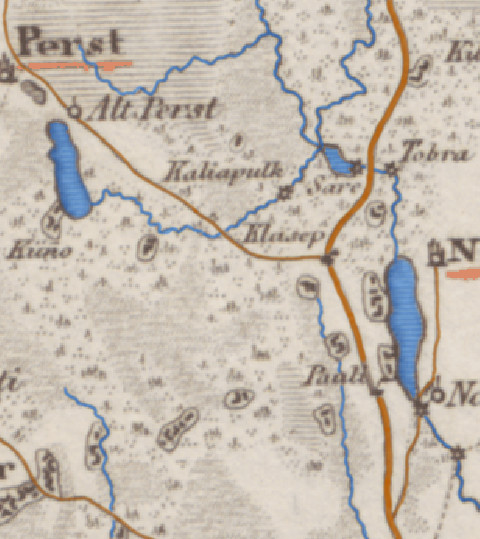 Aindu küla piirkond 1839. aasta Carl Gottlieb Rückeri Liivimaa koloreeritud aluskaardil. Kaardil asuvad põhja-lõuna suunas kulgeva maantee ääres endine Tobra vesiveski koos paisutatud veekoguga ja Aindu (Paali) koos Karula järvega, teeristil Klaassepa kõrts (Klasep) ning Pärsti poole kulgeva tee ääres Vana-Pärsti mõis (Alt Perst) ja Pärsti mõis (Perst). Kuuni järvest (Küno) lähtuva Valuoja endise sängi kõrval asub Kaljapulga talu (Kaliapulk).